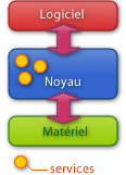 Architecture simplifiée d'un noyau monolithique / v_atekor